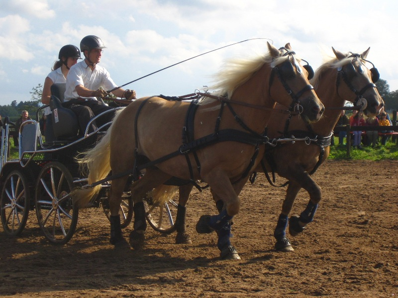 Haflingergespann auf den Pferdetagen Gestüt Deschenhof 2006